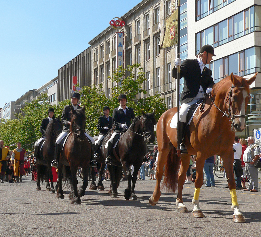 Gildereiterei beim Schützenausmarsch Hannover